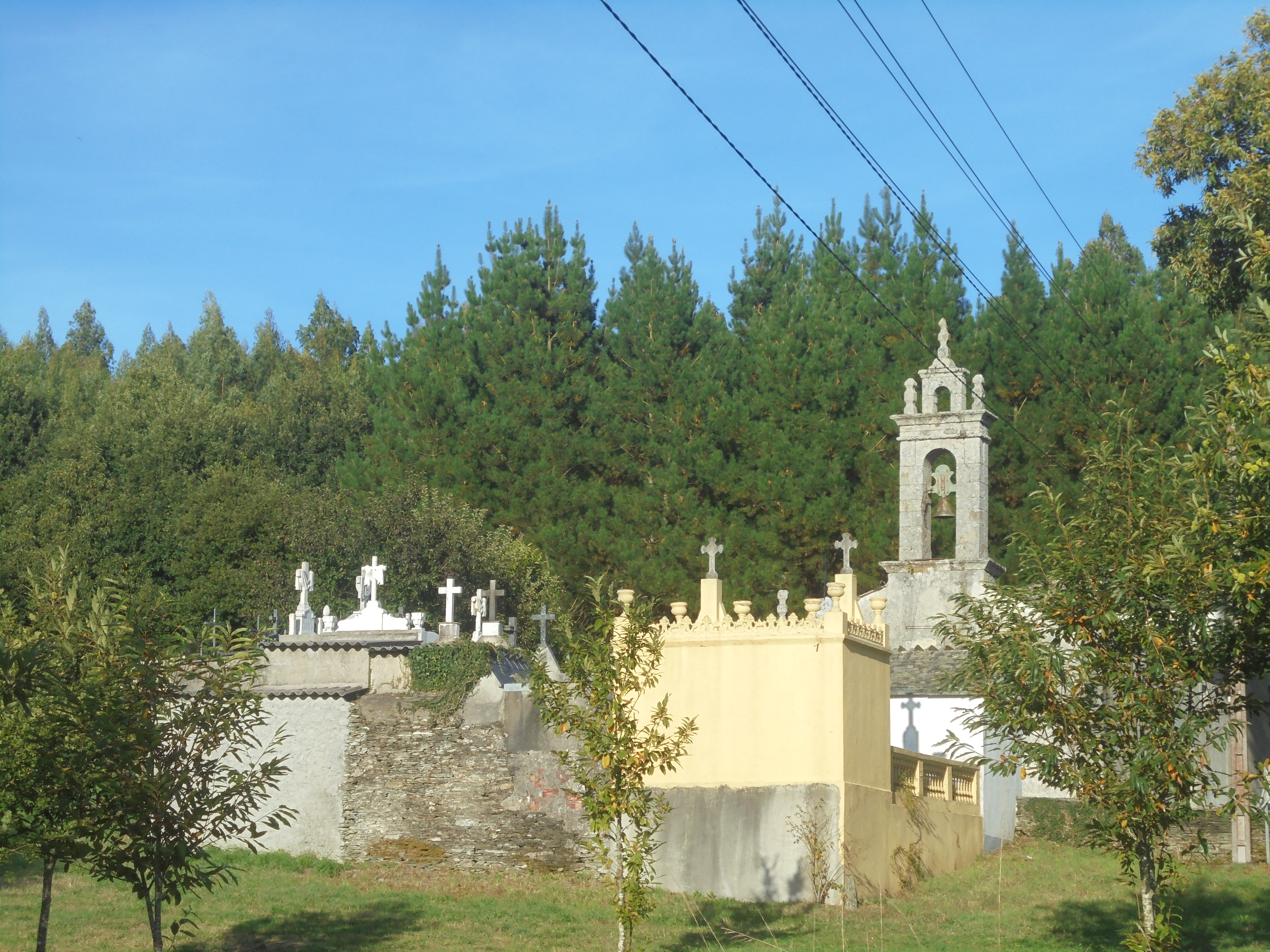 Igrexa parroquial de Santo Estevo de Pol (Pol)